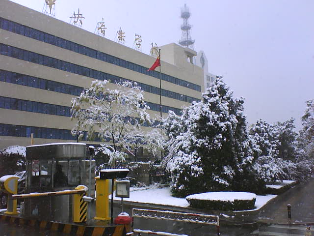 央音